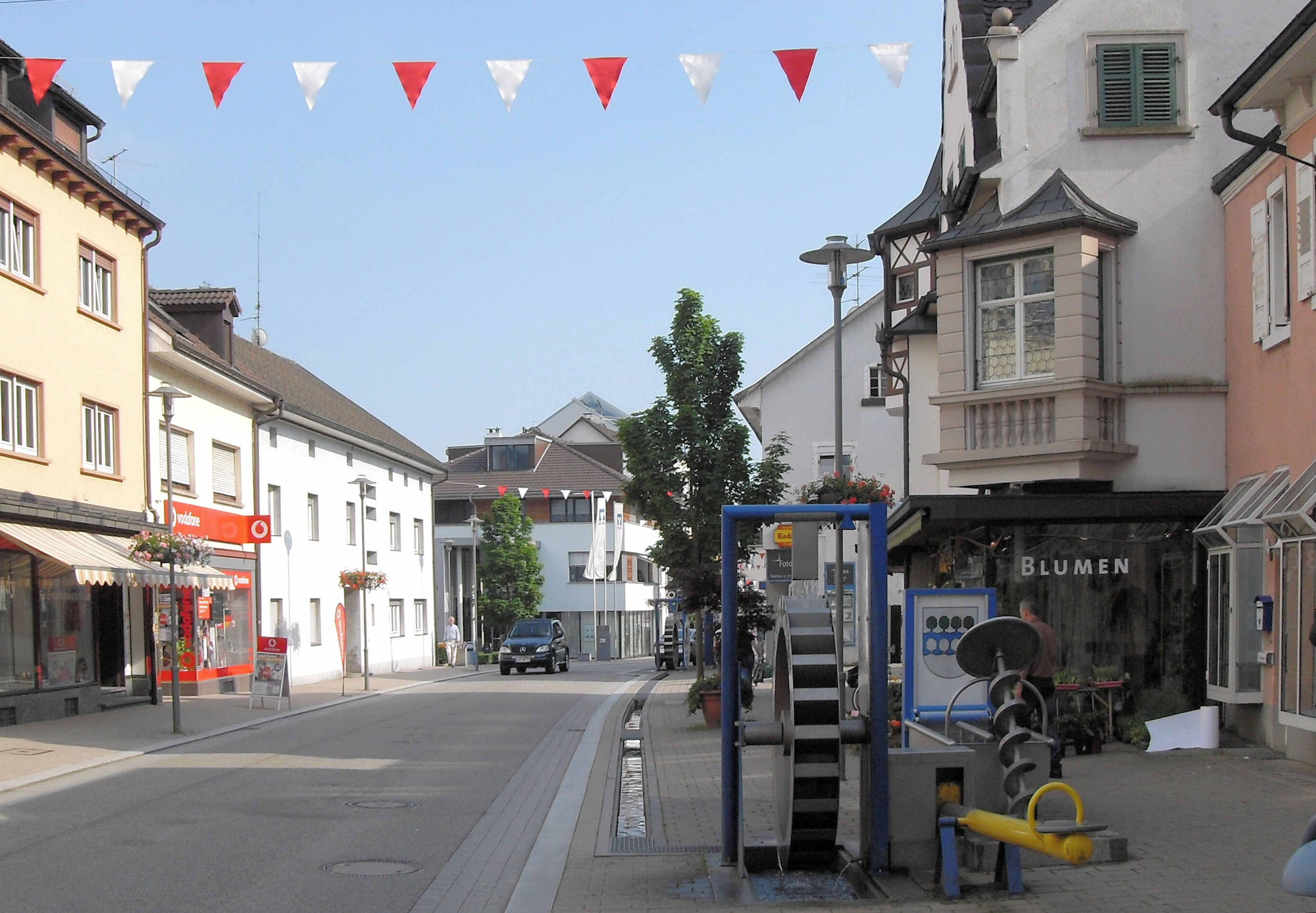 Hauptstraße in Wehr